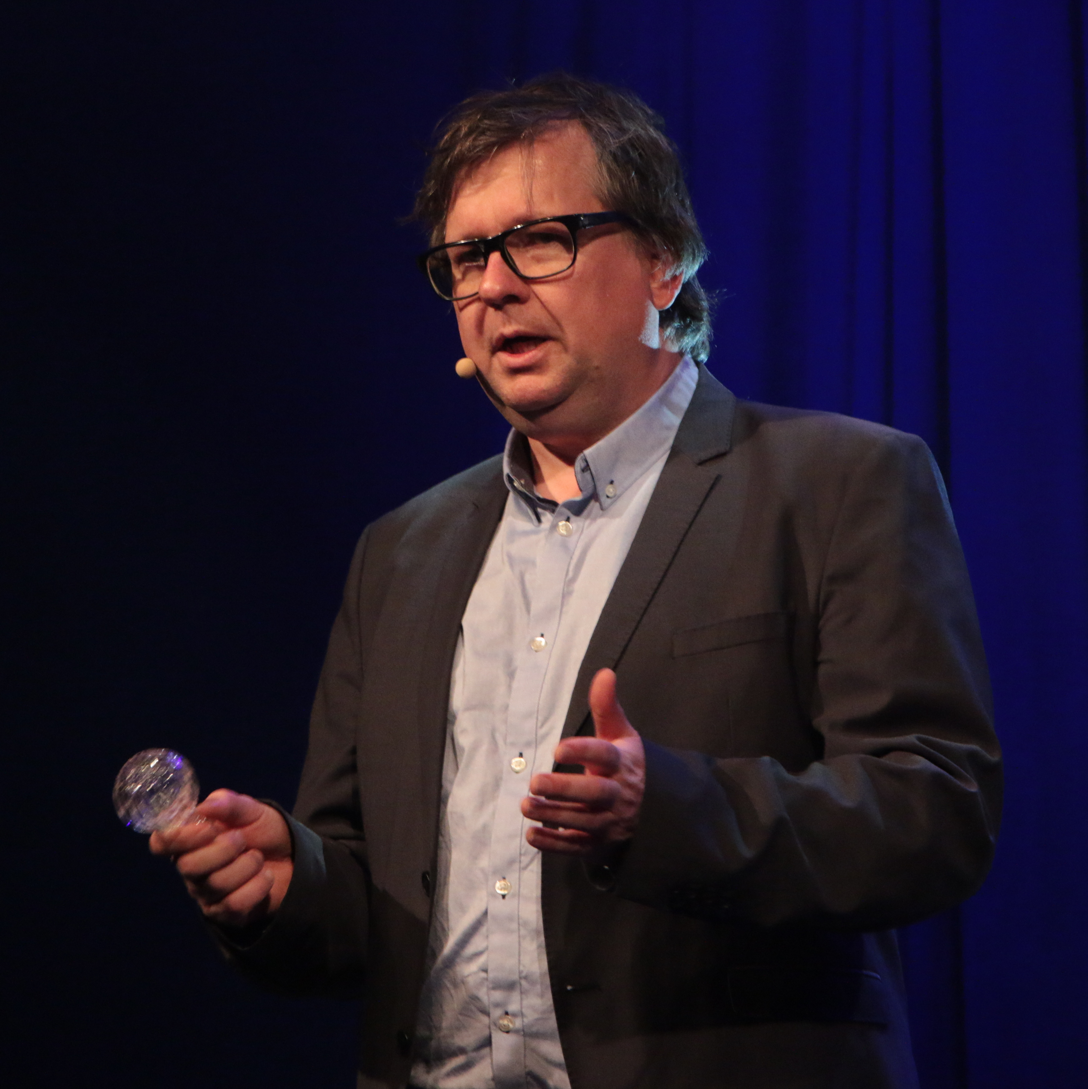 Medvirkende: Finn Tokvam med band & gjester: Frank Aarebrot (UiB, Professor) & Trine Eilertsen (Politisk kommentator, Aftenposten)